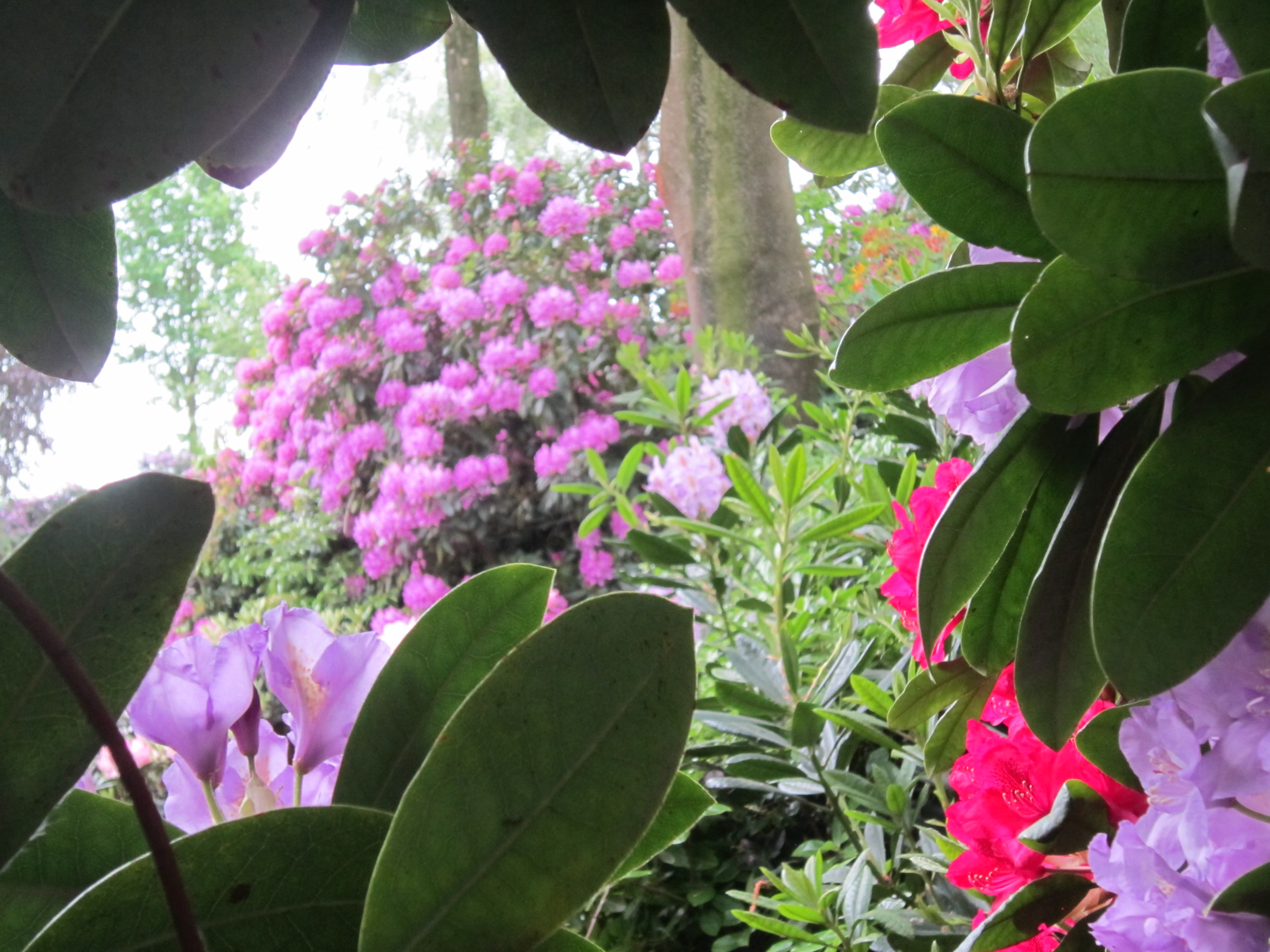 Rhododendronwald Füchtenfeld (Wietmarschen im Landkreis Grafschaft Bentheim, Niedersachsen)